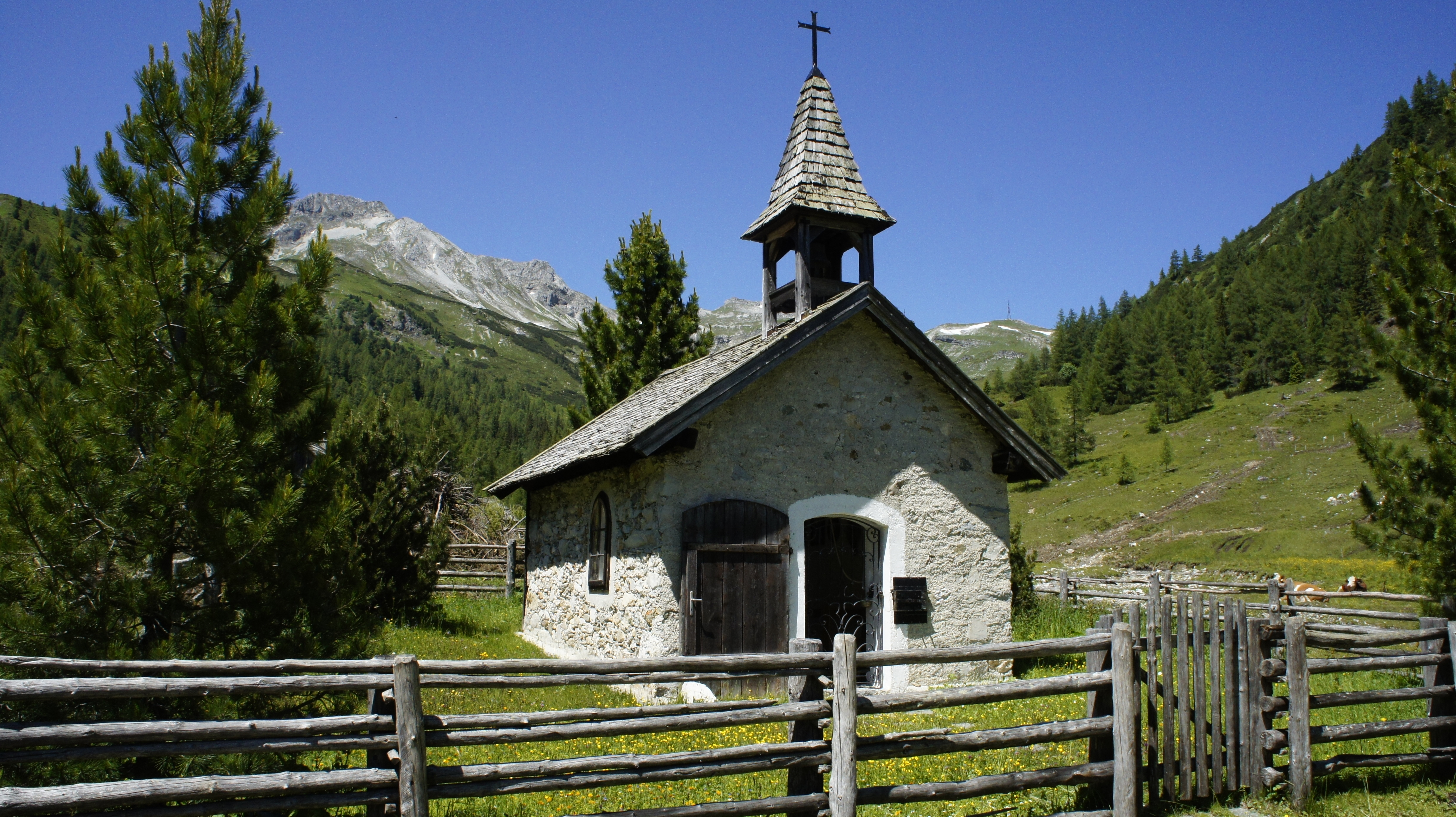 Lantschfeldkapelle